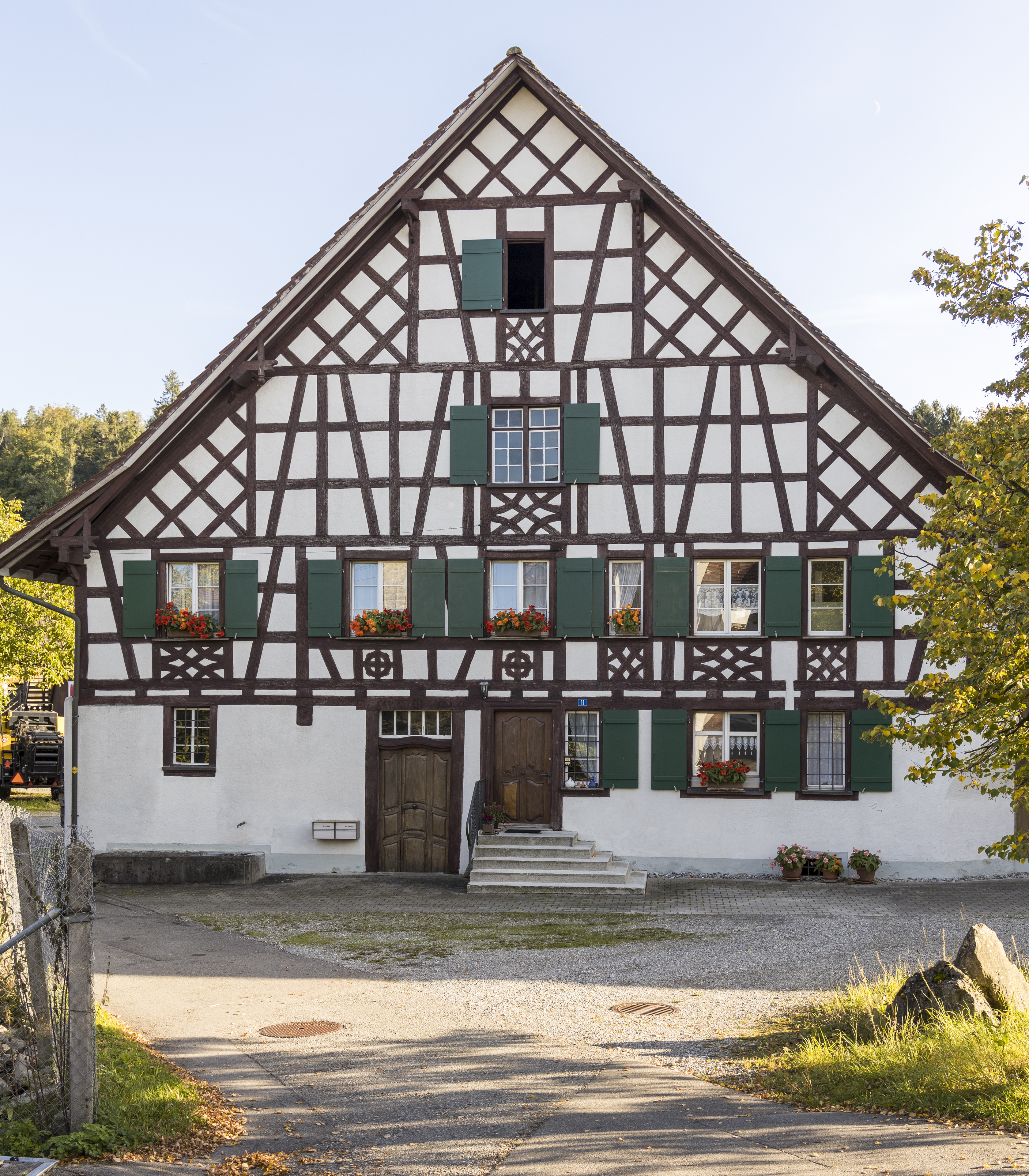 Ehemalige Mühle Wiesendangerstrasse 11 in Bertschikon